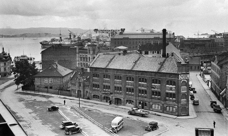 dyresykehus Cheval, Vika politistasjon, bygårder, gateløp, Vestbanestasjonen, Akers mekaniske verksted.